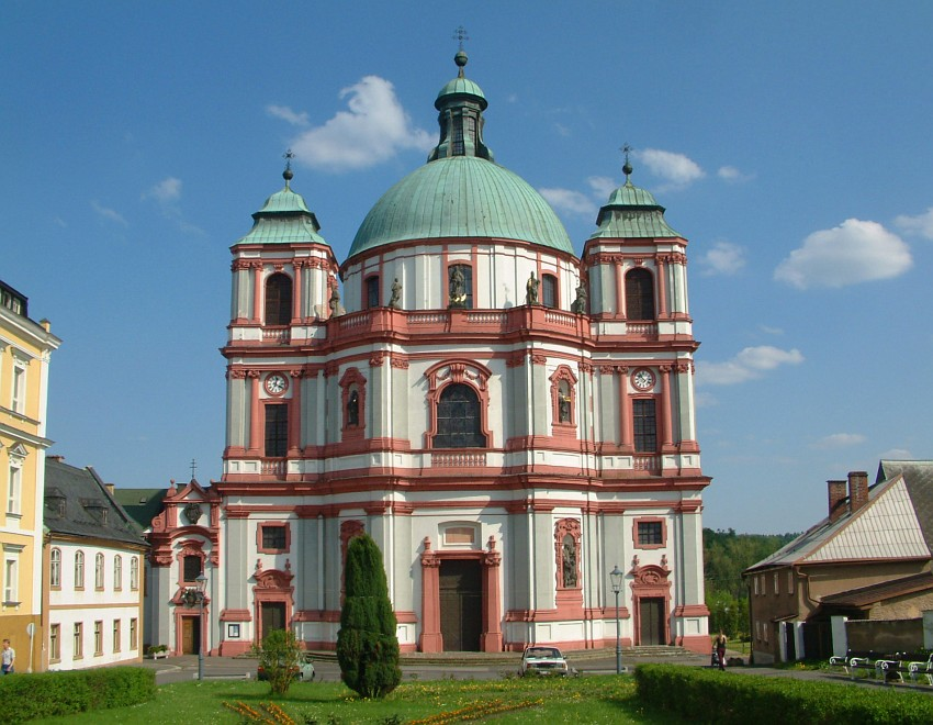 Dom des Heiligen Laurentius, Jablonné v Podještědí, Czech Republic